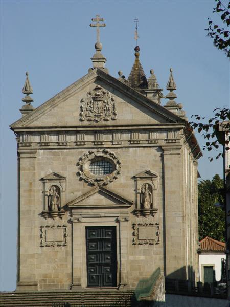 Igreja de São Vitor em Braga Foto de Jose Goncalves